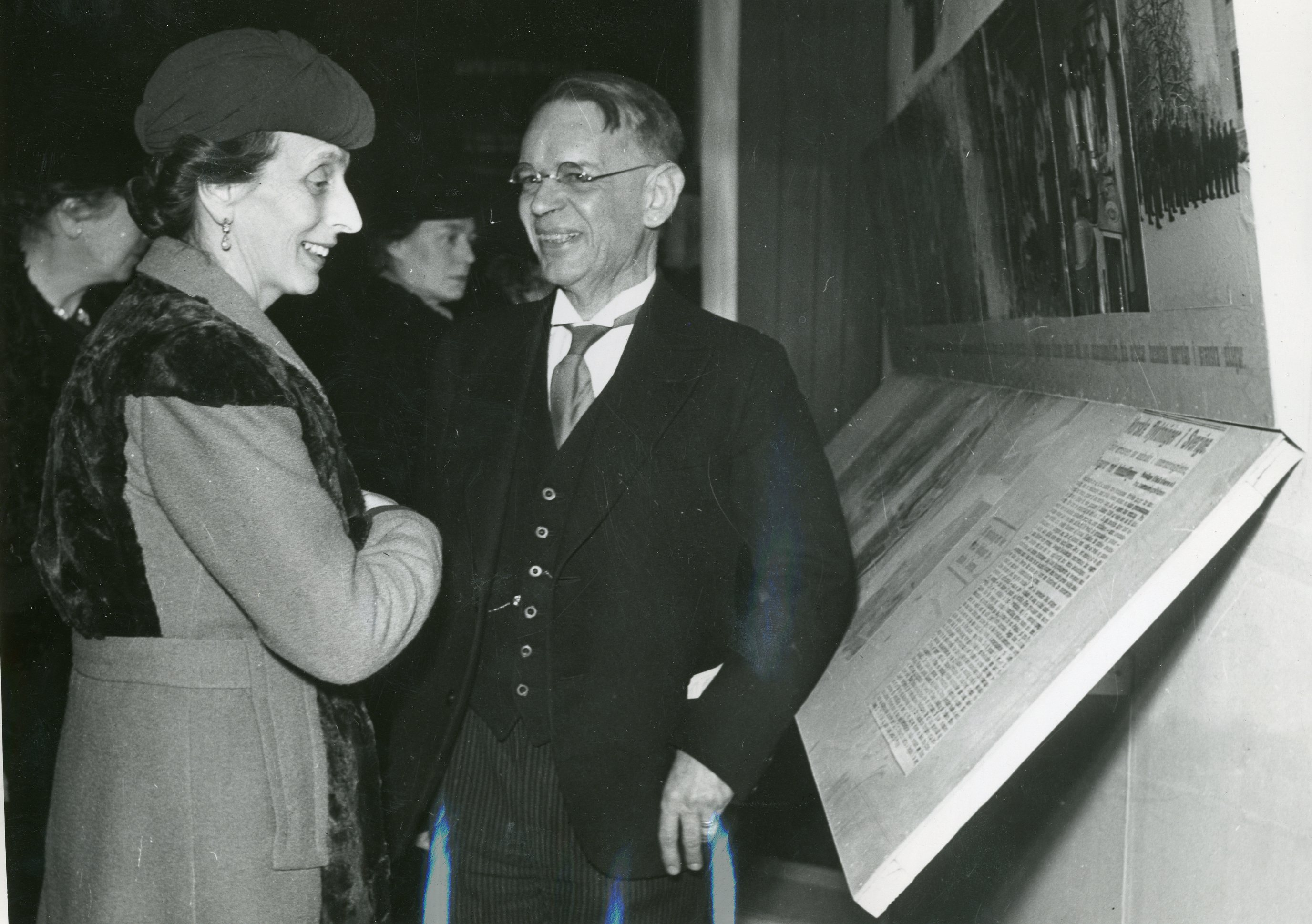 Norsk utstilling I Stockholm. Den 10. mars i år (1943) ble det åpnet en norsk utstilling i Stockholm i nærvær av prinsesse Ingeborg, prins Eugen, utenriksminister Günther, den norske sendemann Jens Bull og sendemenn for de allierte nasjoner. En rekke representanter for den svenske hovedstad var også til stede ved innvielsen. Utstillingslokalene befinner seg i Thulehuset i Sveavegen. Den høytidelige åpning ble foretatt av prins Eugen. Formannen i utstillingskomiteen, professor Ahlmann viser den svenske Kronprinsesse utstillingen ved åpningen 10.3.43. på norgesutstillingen i Stockholm. RA/PA-1209/Uc/66/4/S336